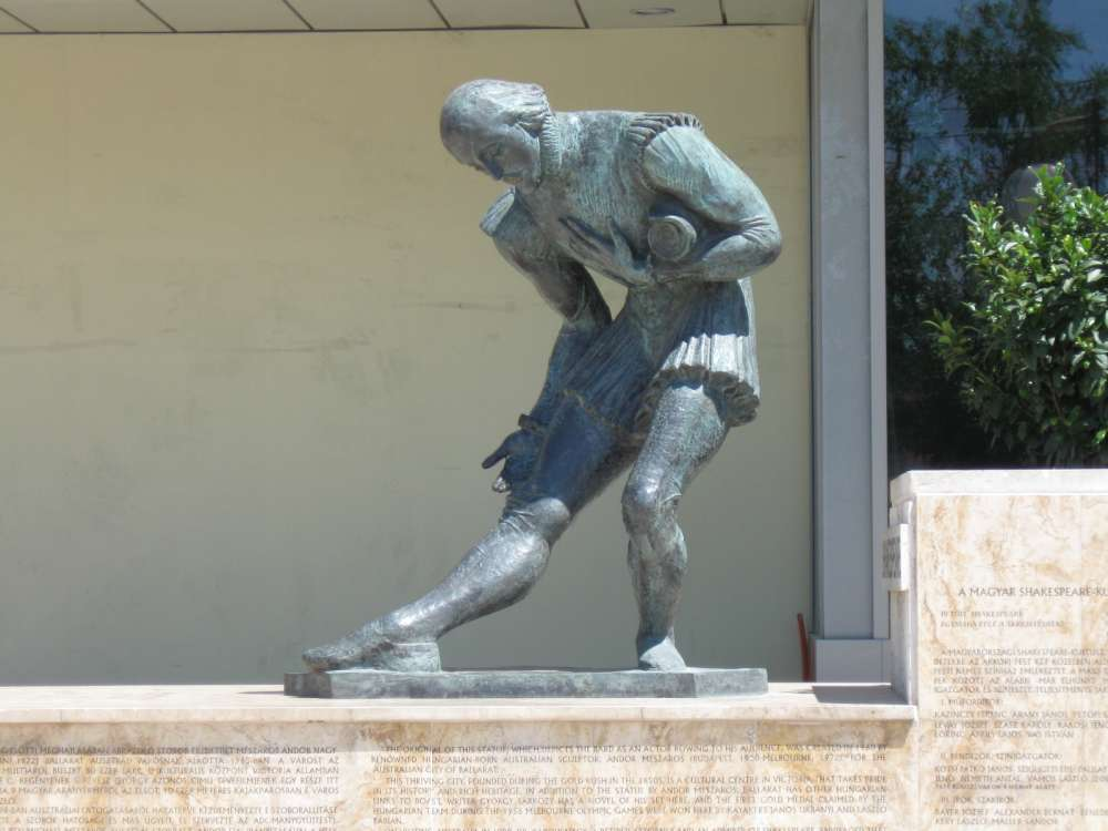 William Shakespeare szobra (szobrász: Mészáros Andor) mészkő, bronz, 2003, állította: Budapesti Shakespeare Szoborbizottság (Budapest, V. ker., Dunakorzó - Belgrád rakpart, Vigadó tér). Megjegyzés: az 1960-ban, Sydney-ben felállított szobor másolata